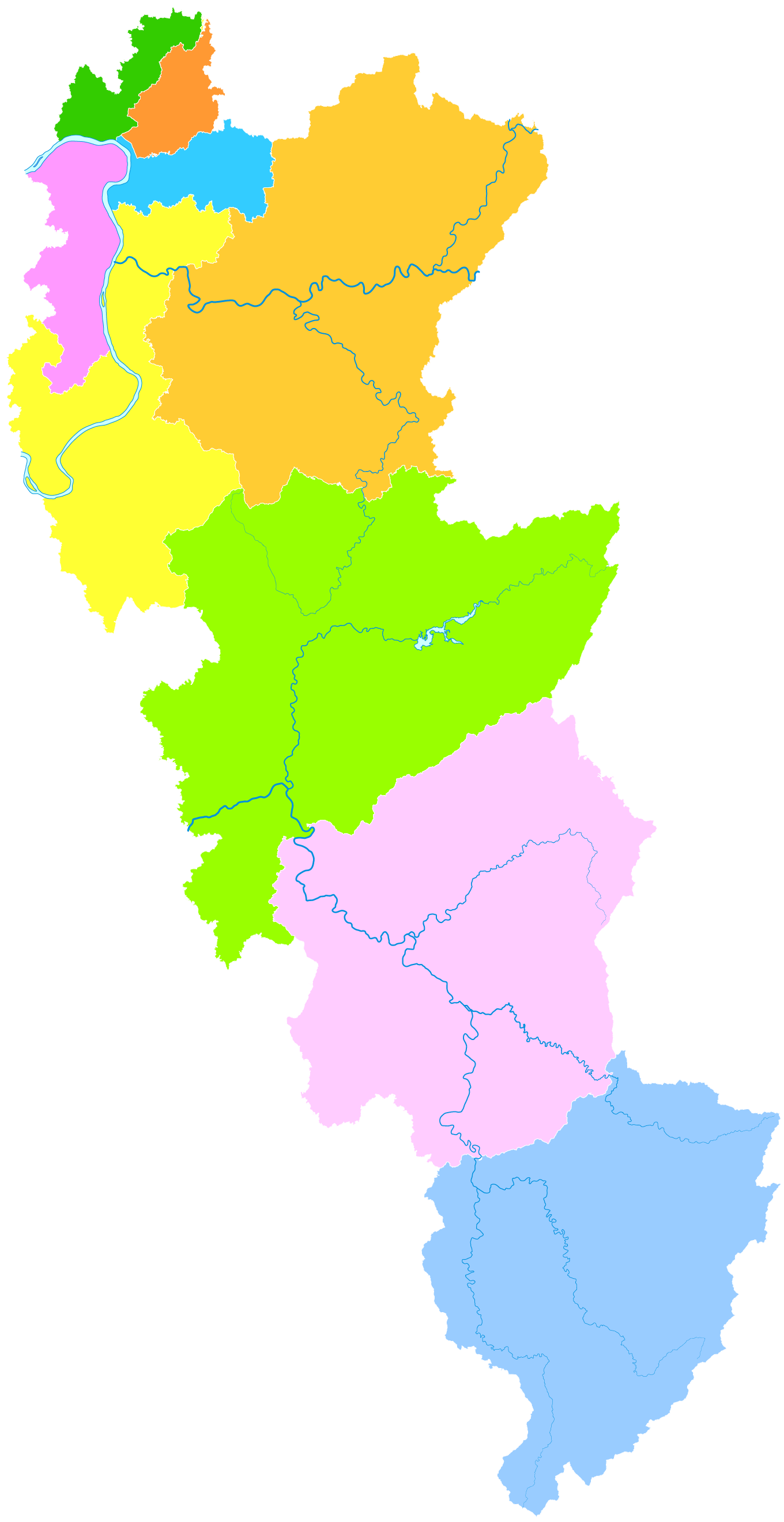 administrative divisions of Zhuzhou City, Hunan, China